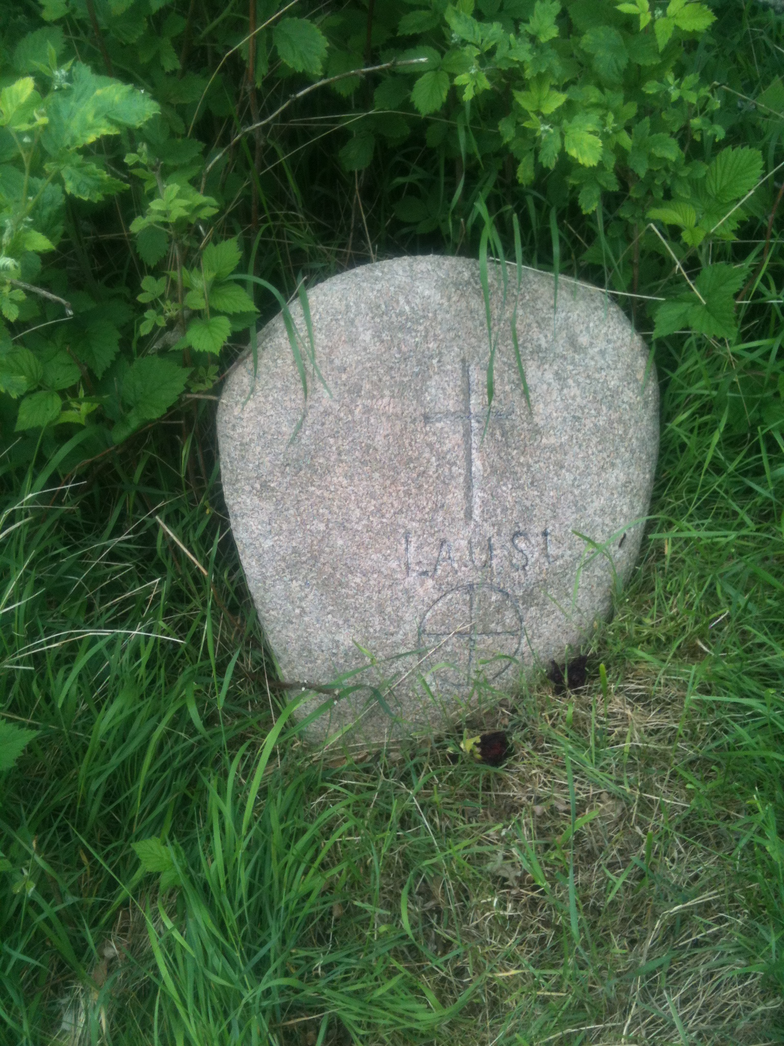 laust gravsten